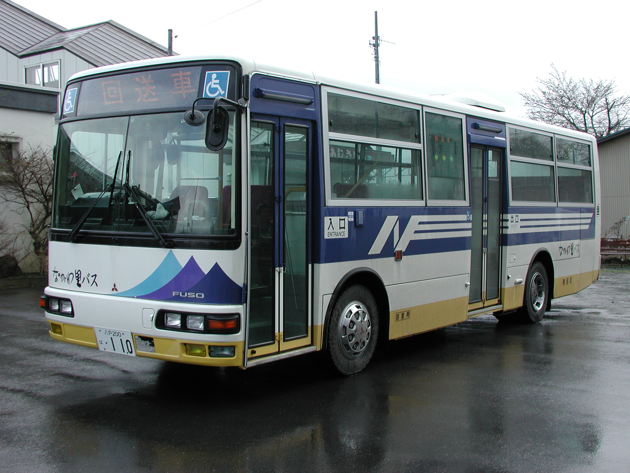 ながわ里バス 三菱ふそう・エアロミディMKワンステップ（KK-MK23HH） 剣吉駅にて